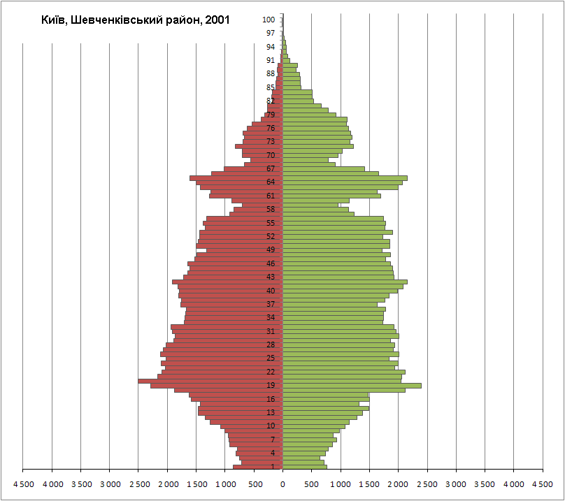 Статево-вікова піраміда населення Шевченківського району Києва за переписом 2001 р.